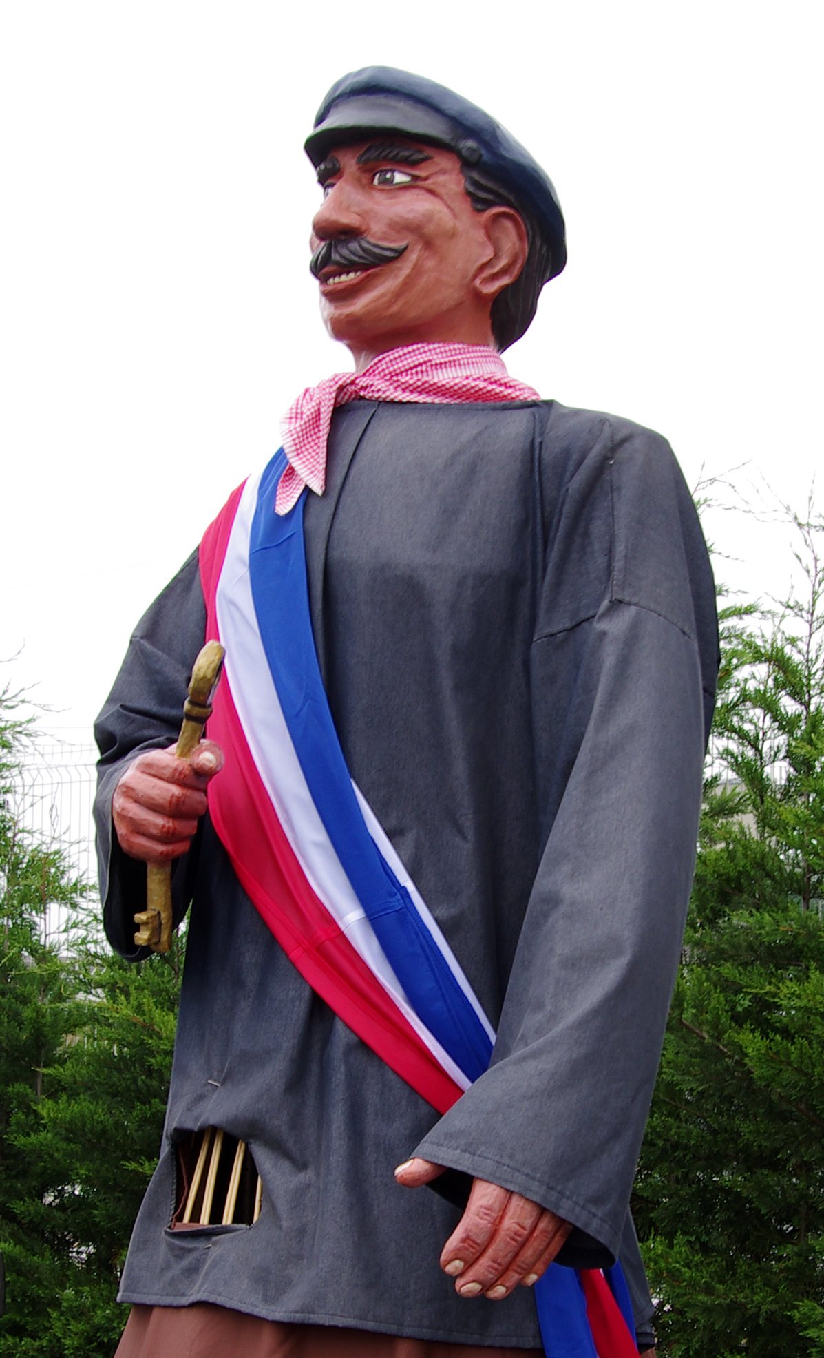 Sainte-Catherine-lès-Arras (Pas-de-Calais, France) - Animation festive avec défilé de géants, un dimanche de juin. Le départ du parcours est prévu route de Béthune, depuis le parking du supermarché "Intermarché". Le géant de Maing, Tiot Mitt, avec sa clé et son écharpe tricolore.